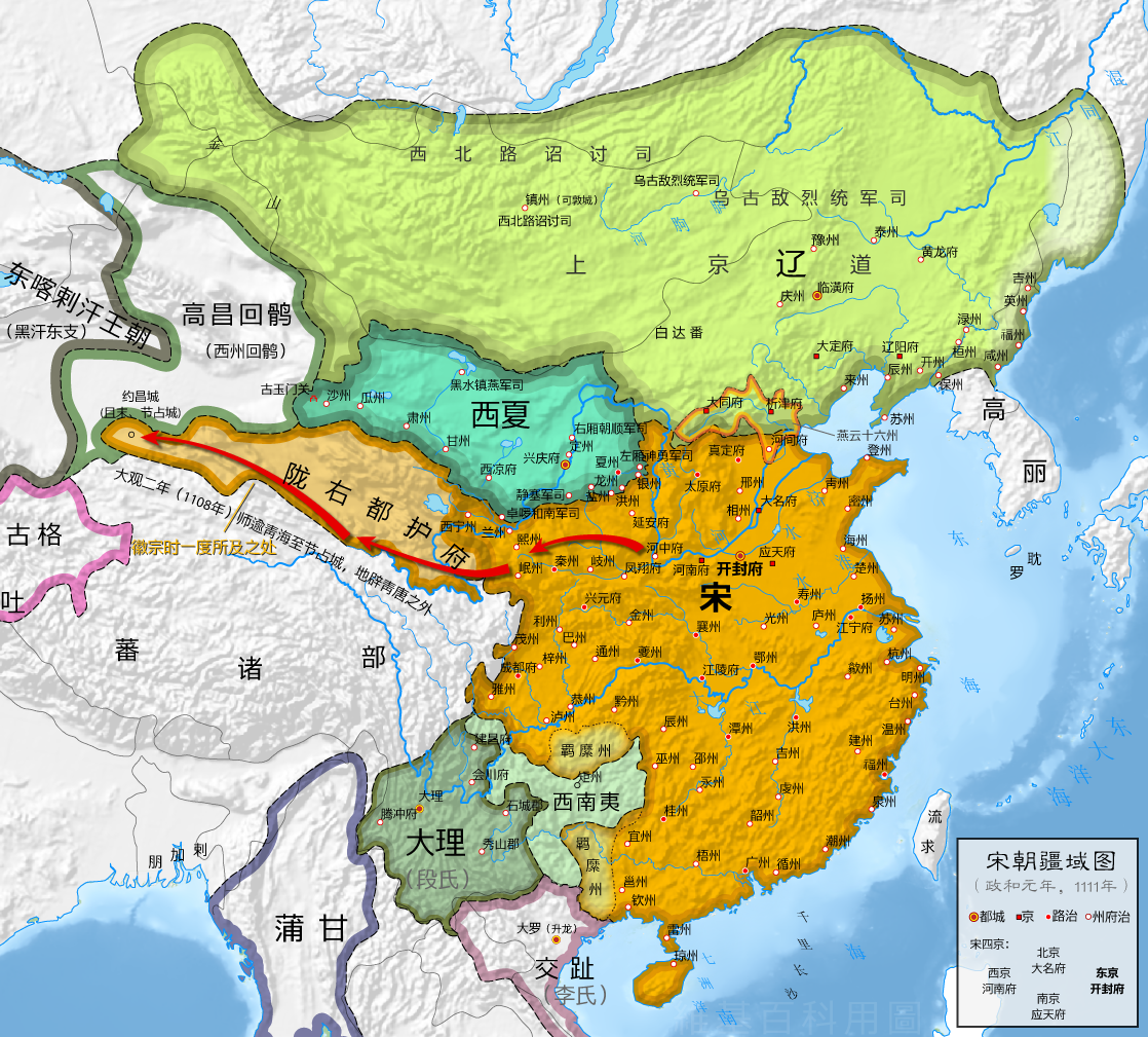 北宋疆域图